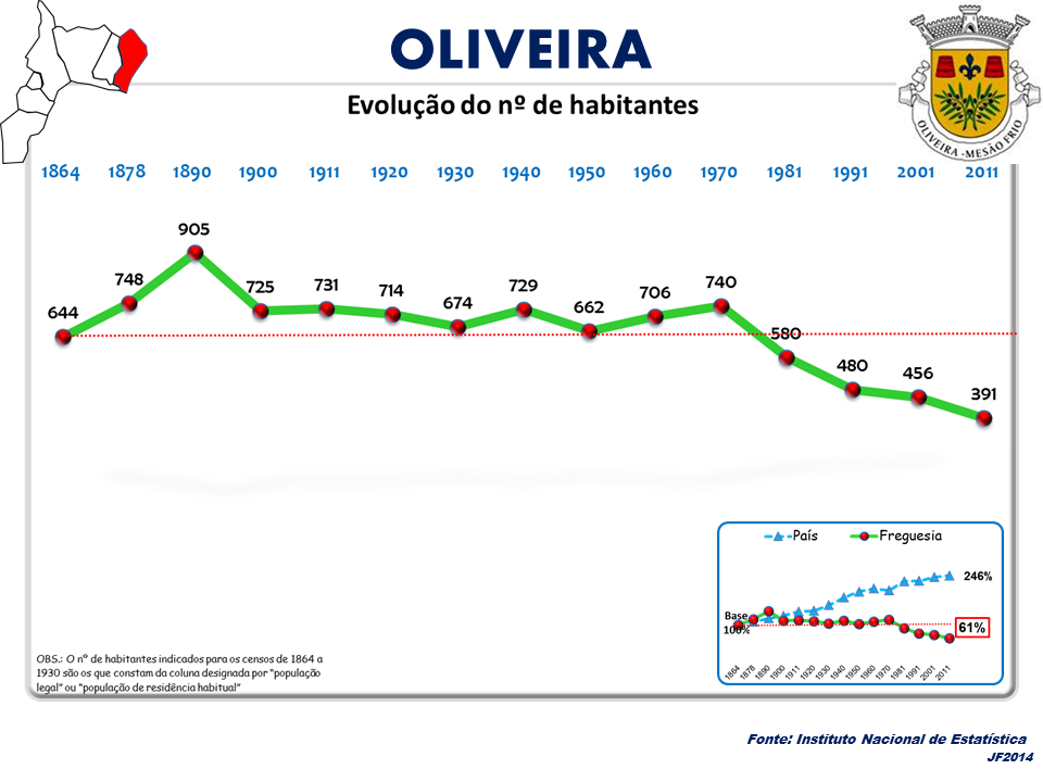 Evolução da População 1864 / 2011